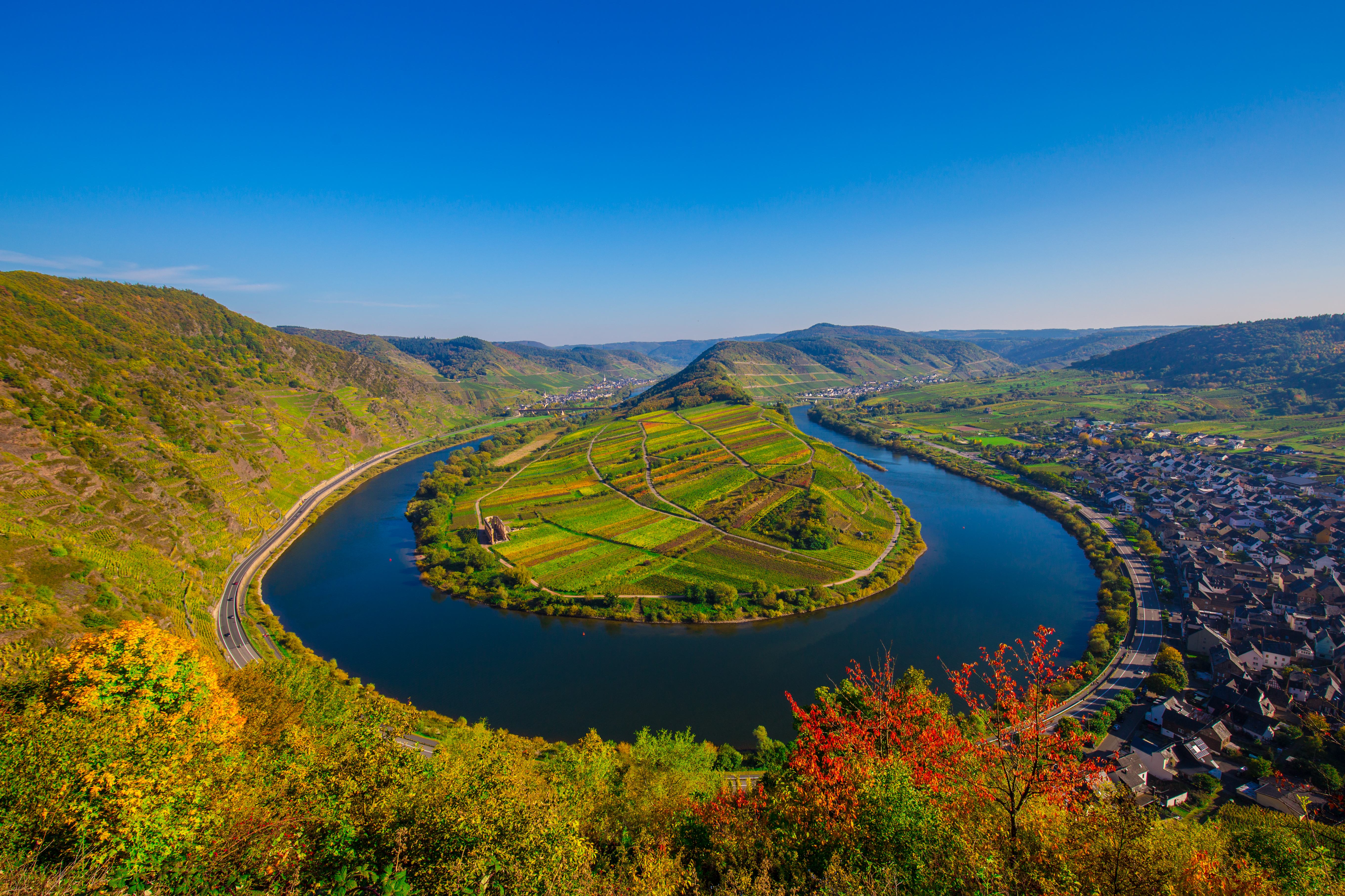 11.Okt.2015